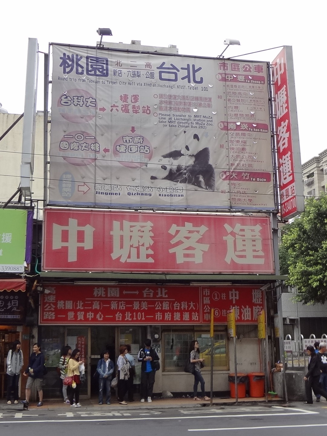 中壢客運桃園站，位於臺灣桃園市桃園區復興路142號。